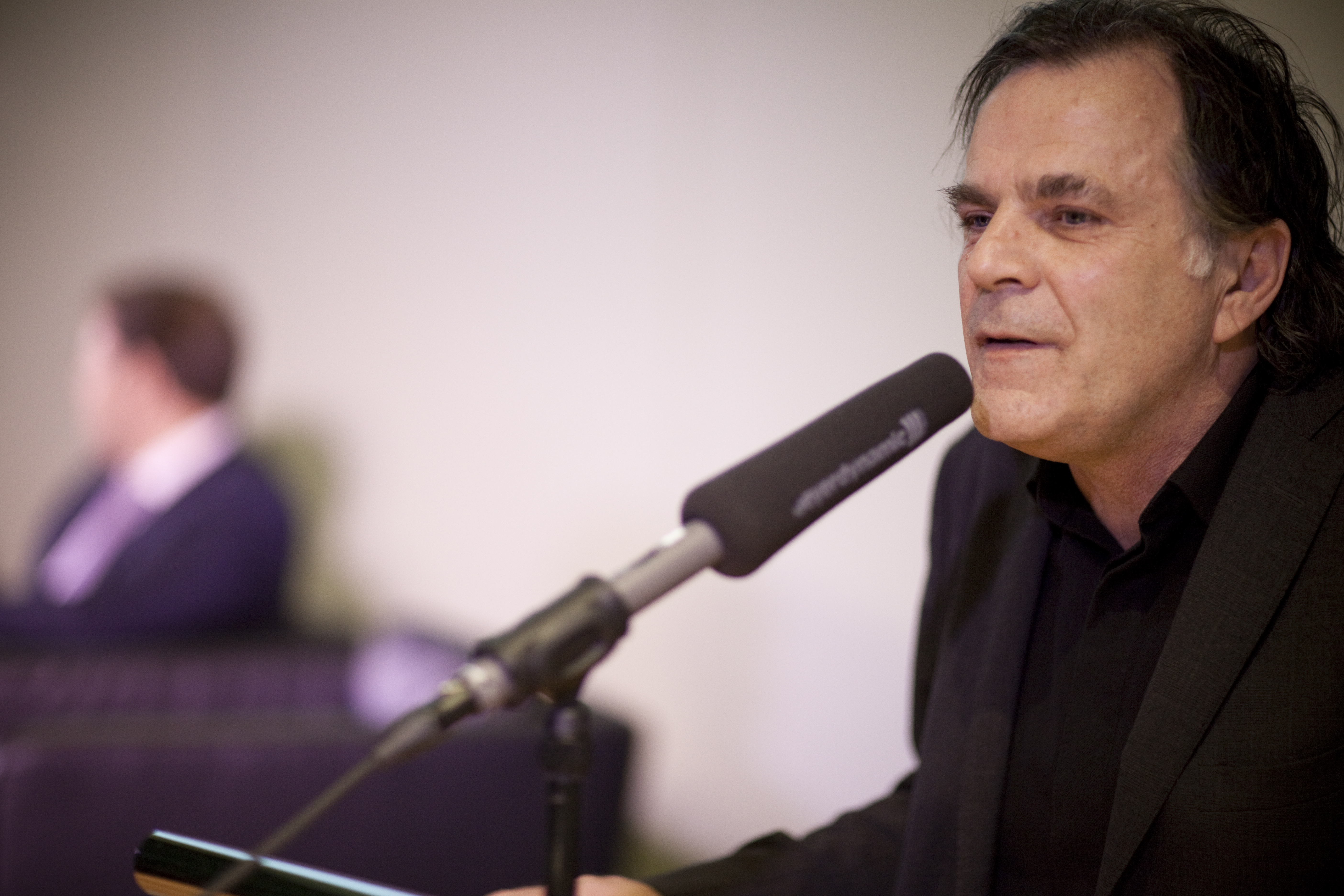 Festkonzert anlässlich des AT-Ratsvorsitzes